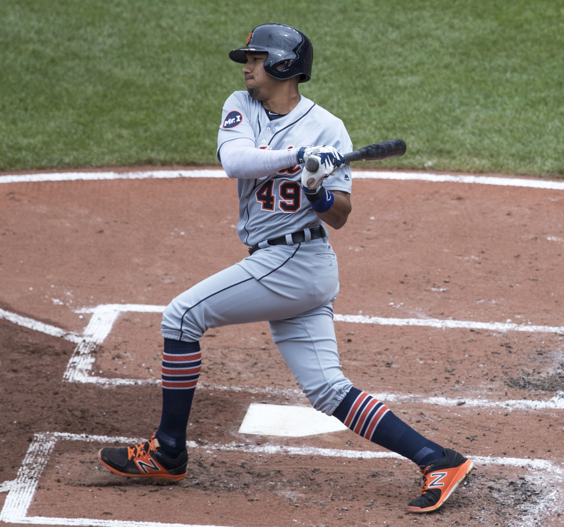 Tigers at Orioles 8/6/17